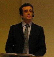 Foto di Roberto Bondì